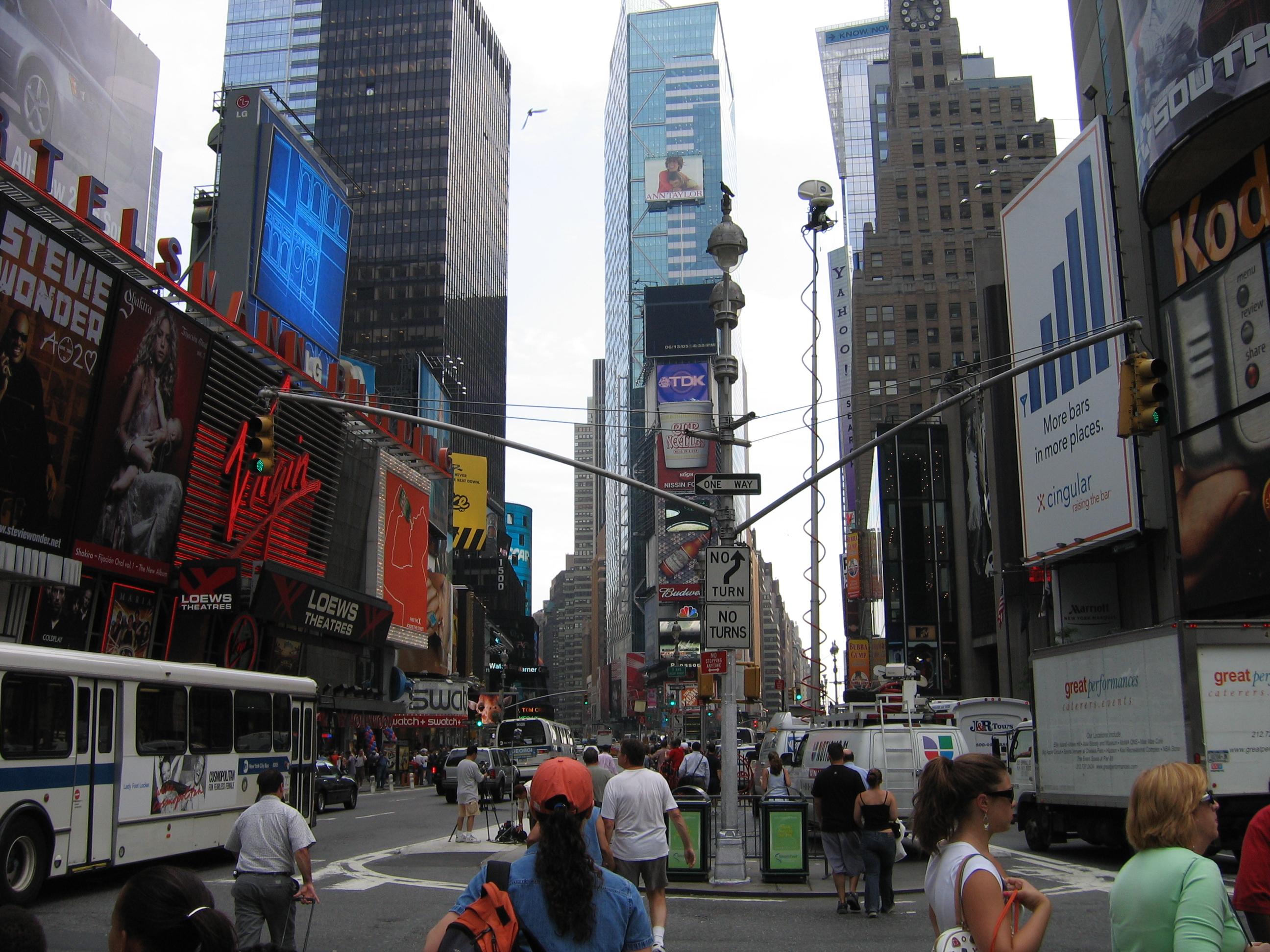 Times Square